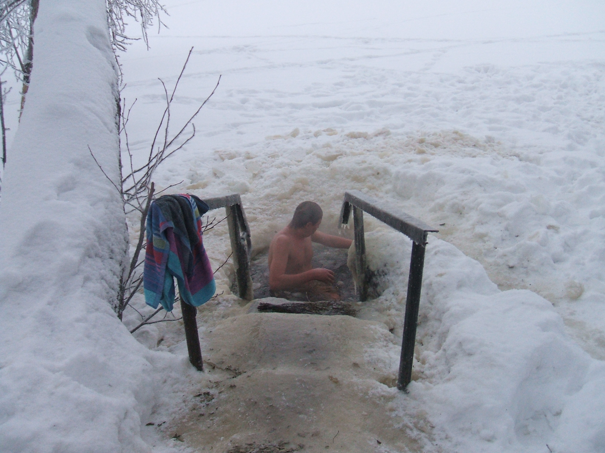 прорубь Сестрорецкой бани